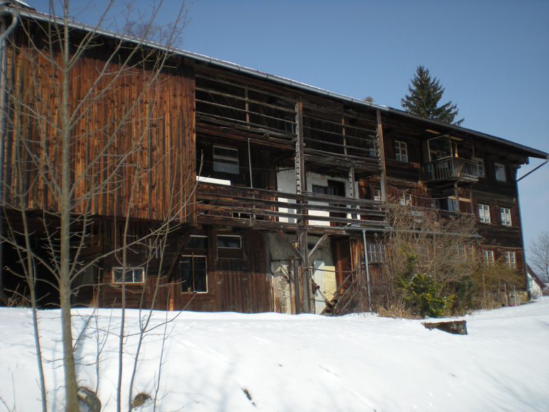 Bauernhaus "Villa Goldonkel" in Pfronten, Ansicht von Süden